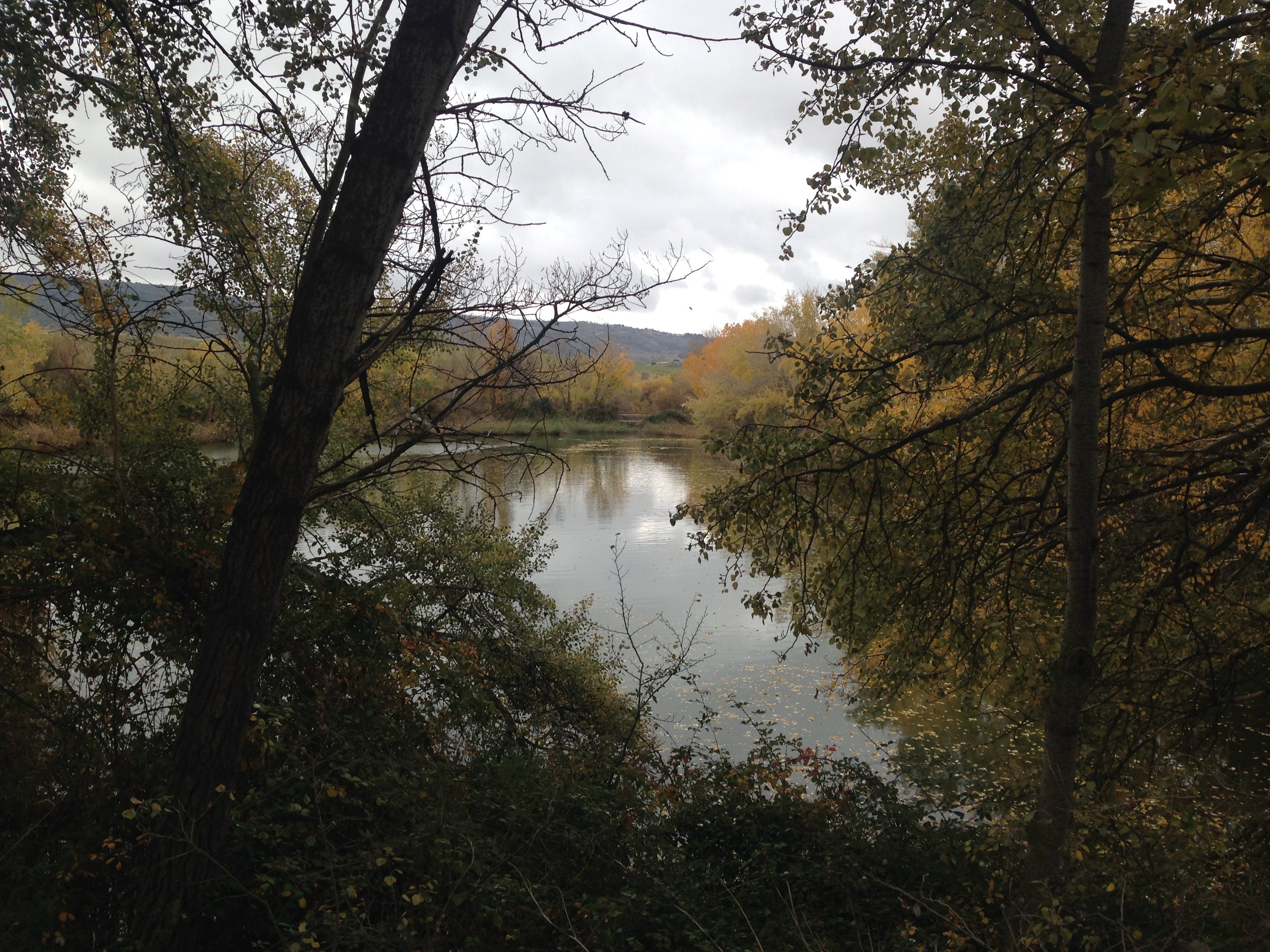 Reserva ornitológica en el municipio español de Azuqueca de Henares. Vista de una de sus cuatro lagunas en otoño